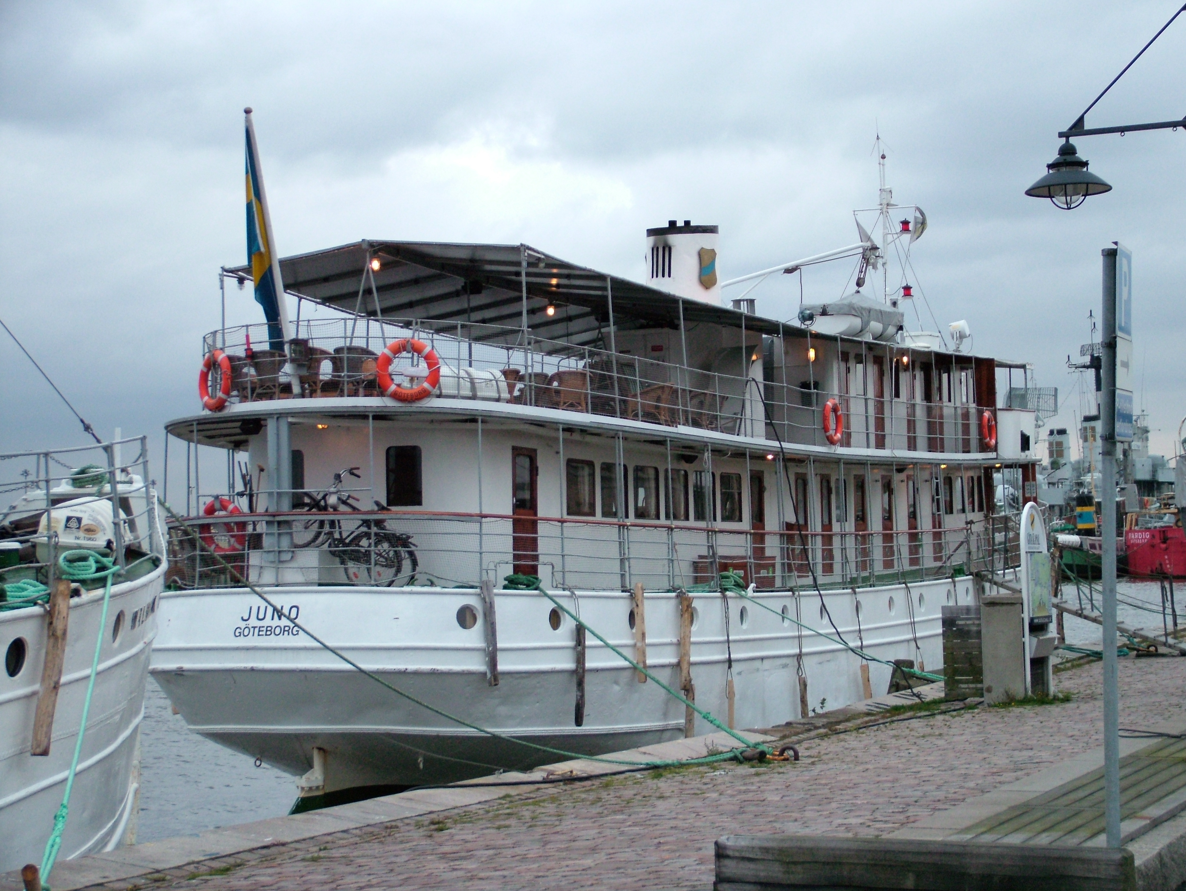 Die Juno ist ein Passagierschiff, das den Götakanal in Schweden befährt. Hier ligt es im Hafen von Göteborg.